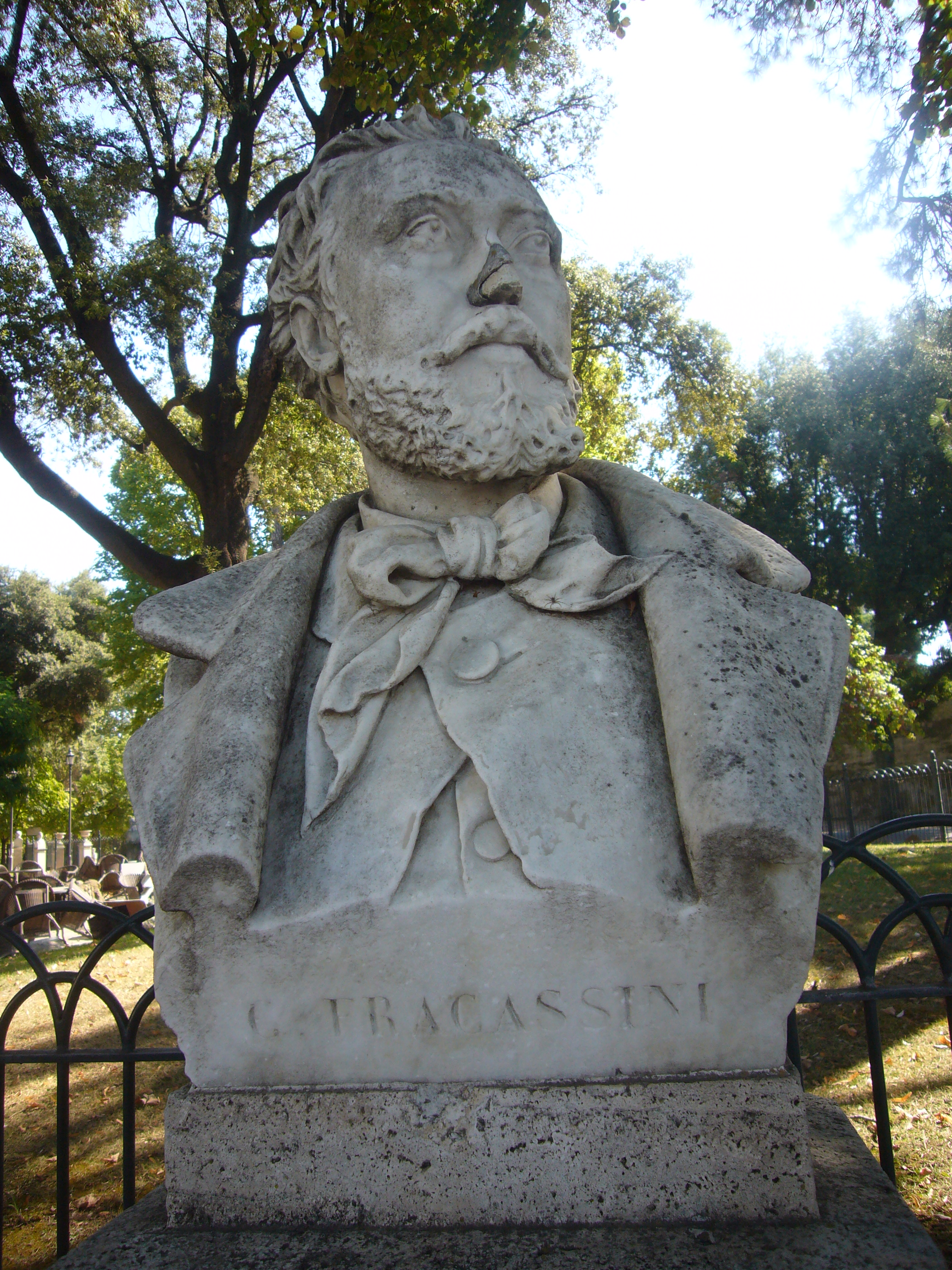 Roma, Pincio. Busto di Cesare Fracassini